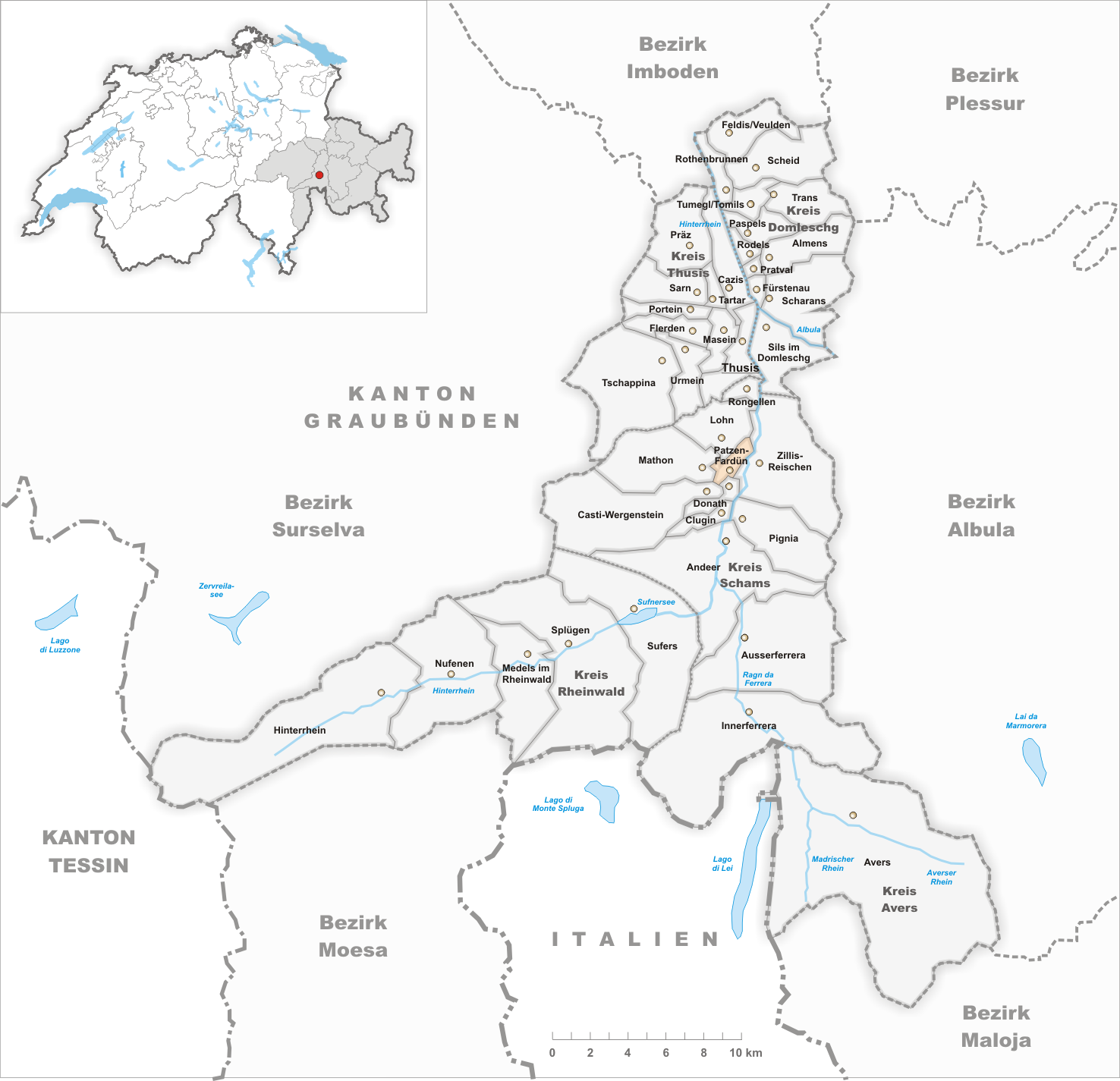 Municipality Patzen-Fardün Artist: Tschubby